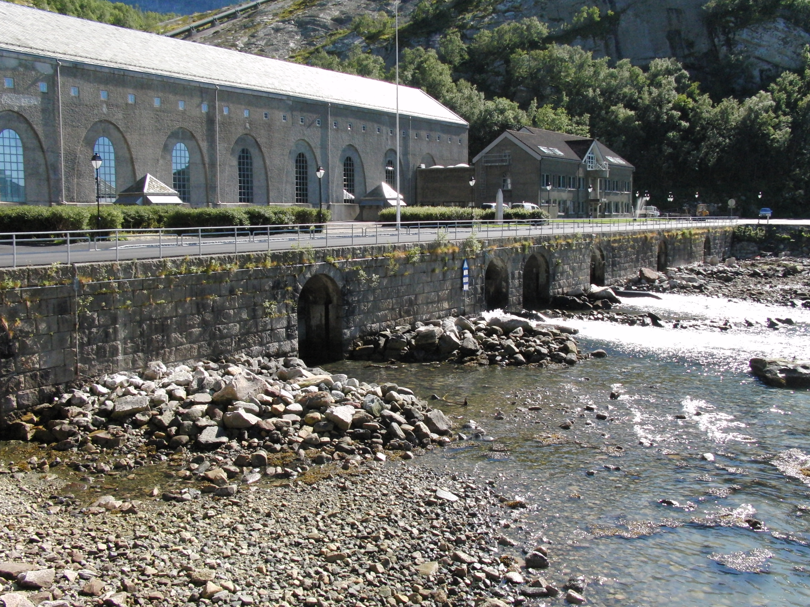 Glomfjord / Fykanvannet kraftverk